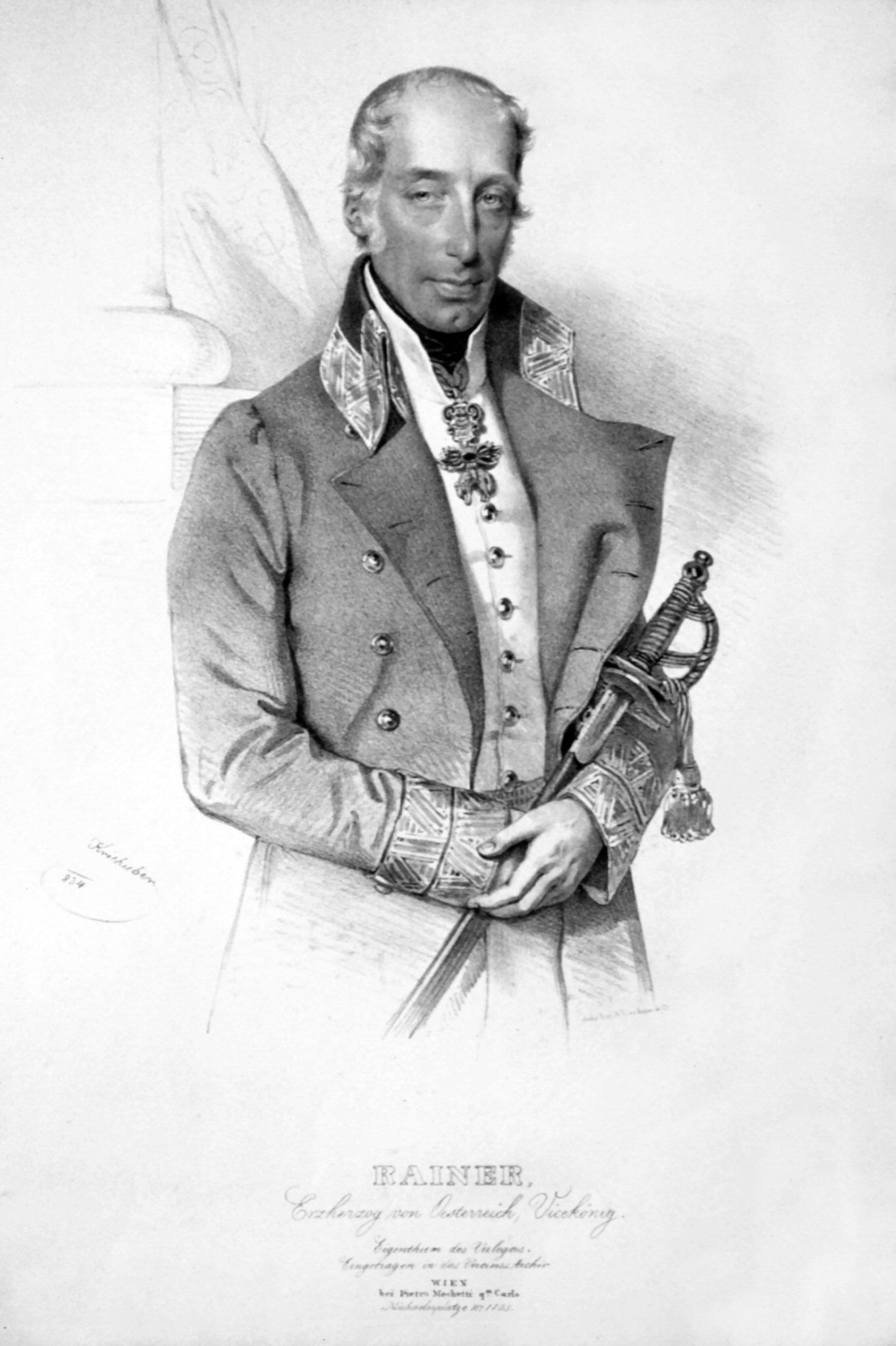 Erzherzog Rainer Joseph Johann, Vizekönig der Lombardei